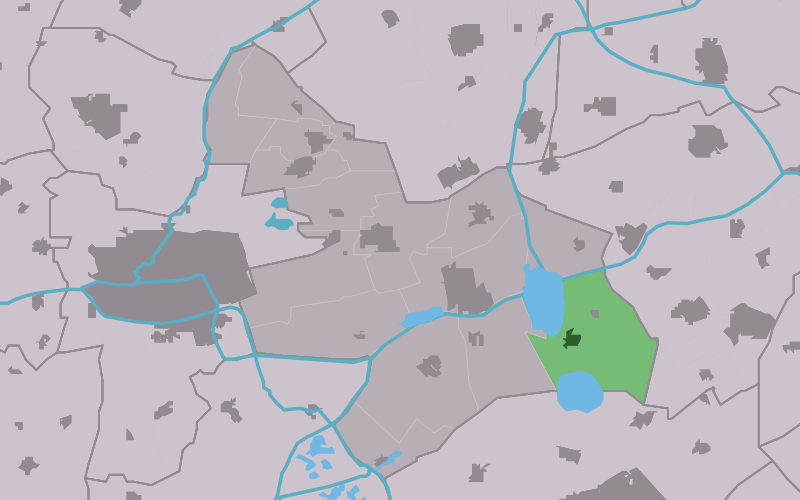 Kaartsje fan himrik fan Eastermar